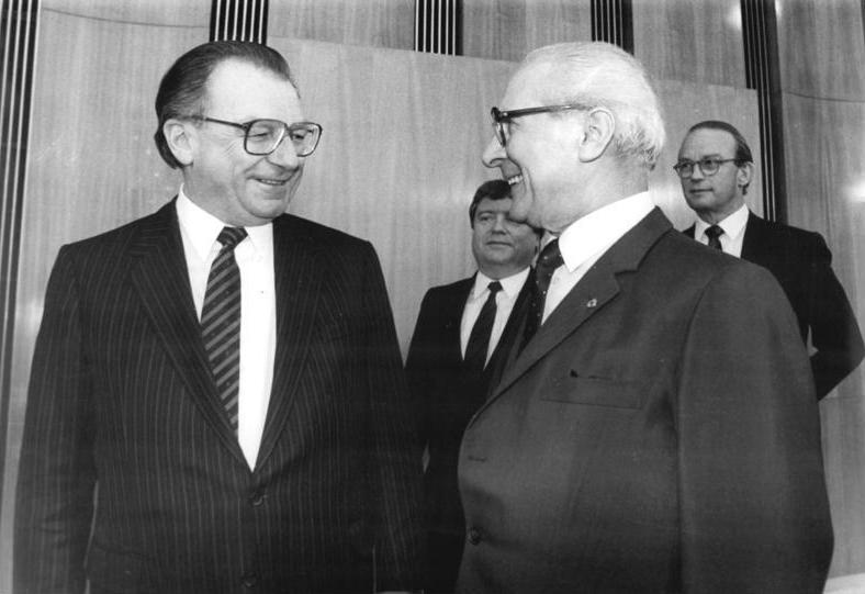 ADN-ZB Mittelstädt-16.3.87-A Berlin: Erich Honecker empfing Lothar Späth-Der Generalsekretär des ZK der SED und Vorsitzende des Staatsrates der DDR, Erich Honecker, empfing den Ministerpräsidenten des BRD-Landes Baden-Württemberg und stellvertretenden Vorsitzenden der CDU, Dr. Lothar Späth, zu einem Gespräch. (s. auch Nr. 1987/0316/30 und 31!)